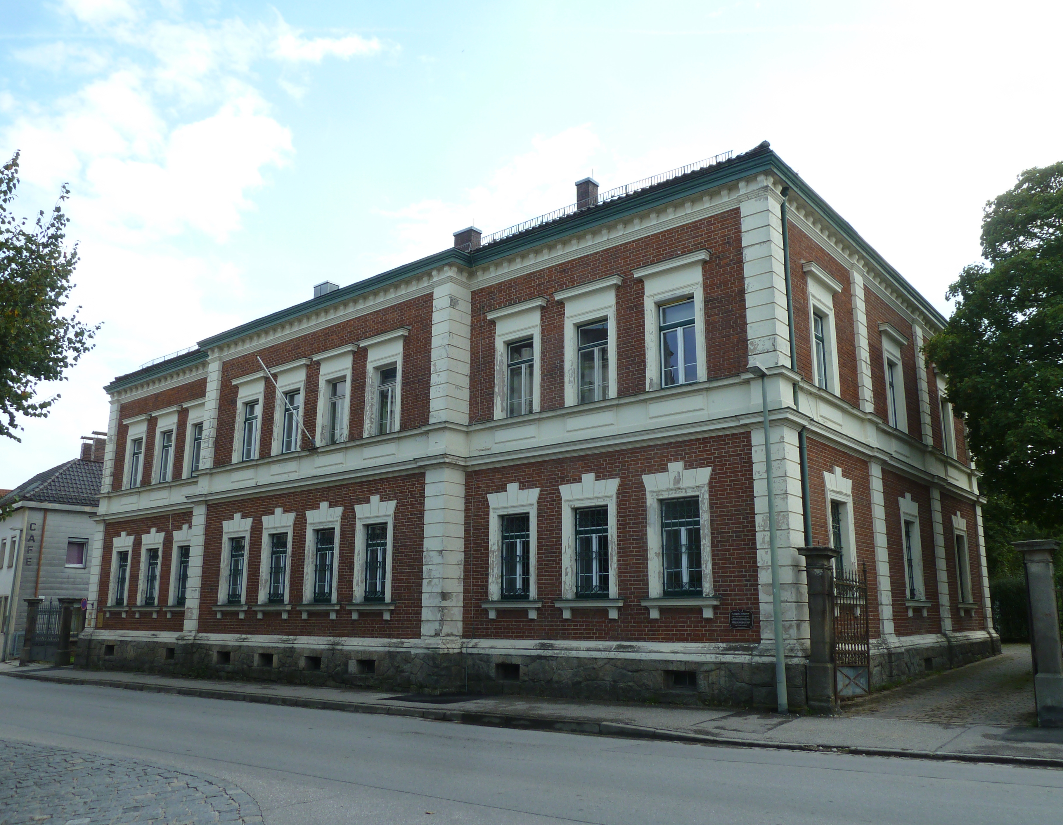 Neumarkt-St. Veit, Denkmalgeschütztes früheres Amtsgericht Bahnhofstraße 21